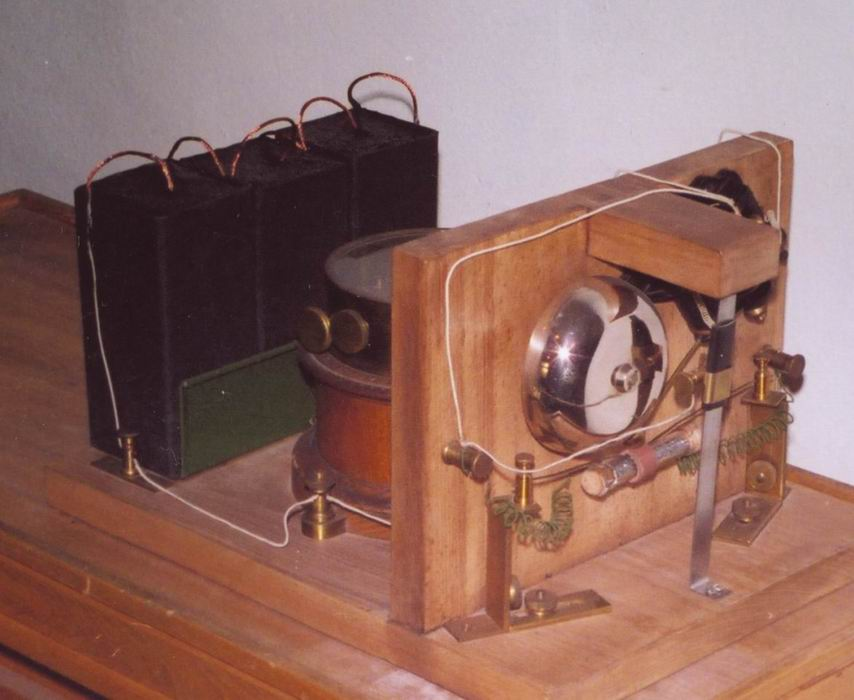 Приёмник Попова.